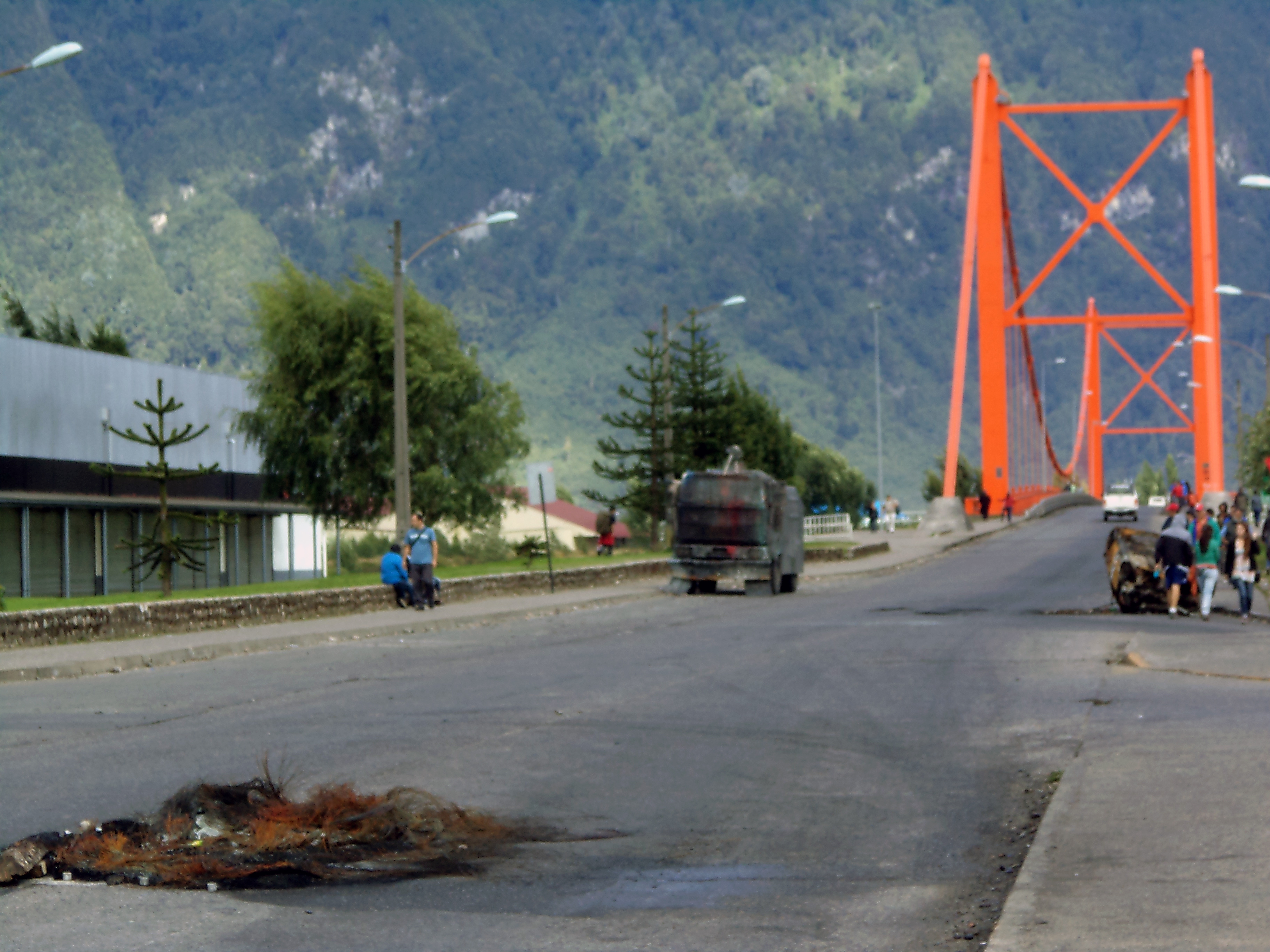 Barricadas instaladas en el Puente Presidente Ibáñez (Puerto Aysén, Chile) en el marco de las protestas de 2012.